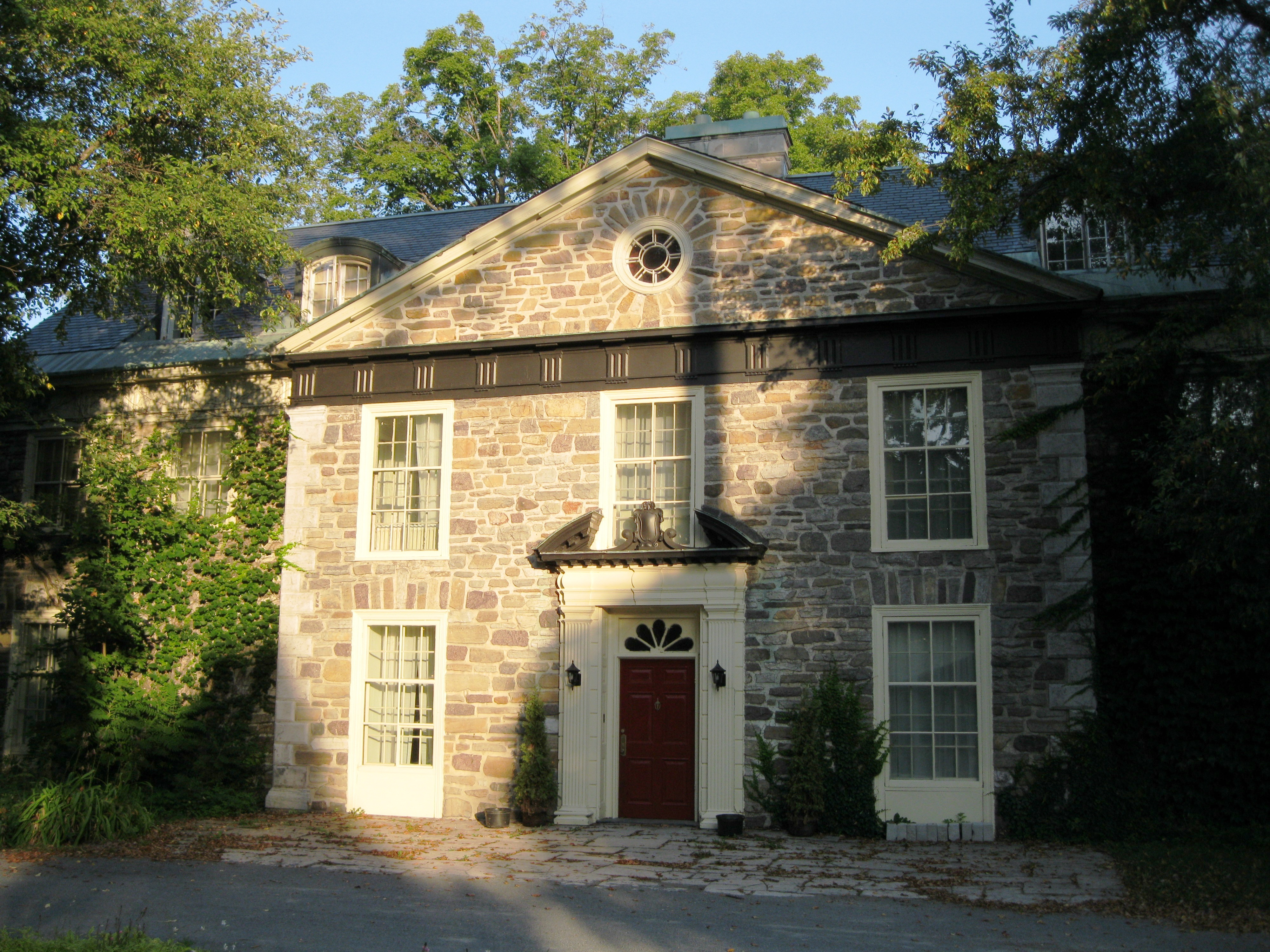 La maison Mary-Dorothy-Molson, citée monument historique, est une résidence bourgeoise de villégiature d'inspiration néogeorgienne construite en 1929. Elle est située au 9095 boulevard Gouin Ouest dans l'arrondissement Ahuntsic-Cartierville à Montréal.